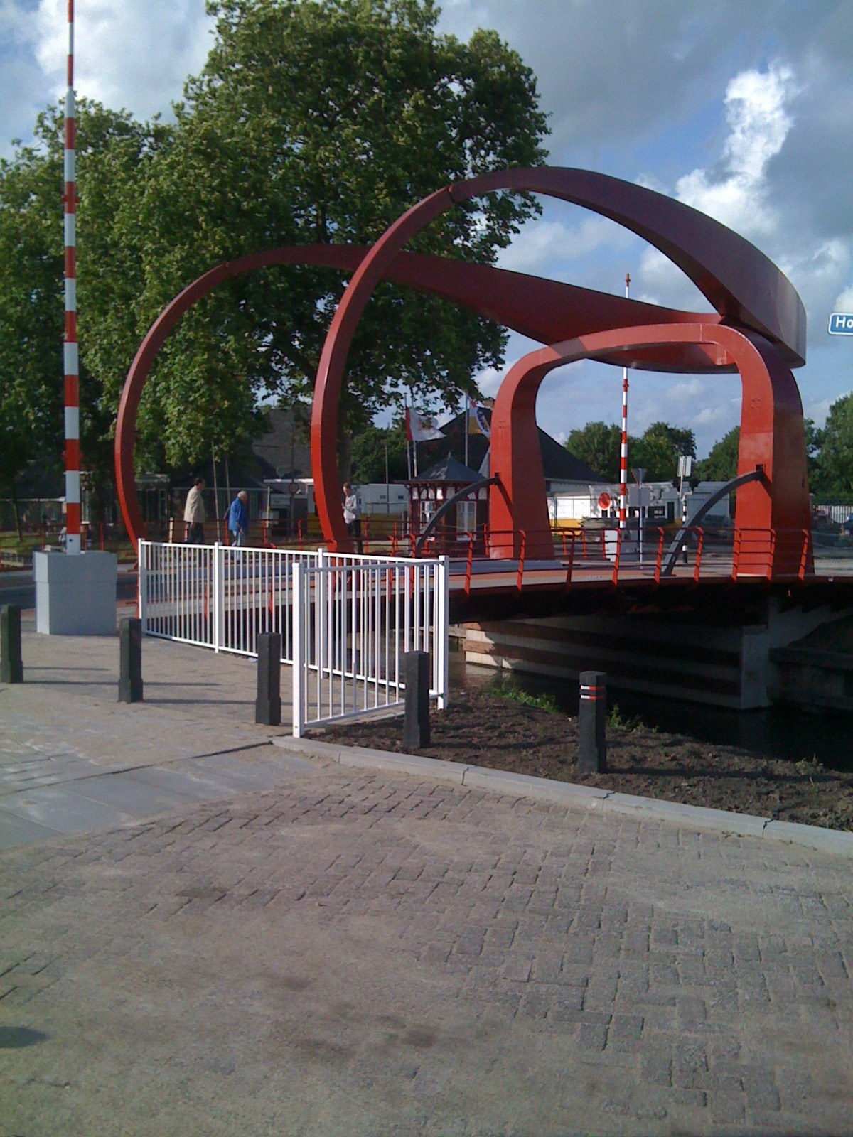 Nieuwe Rodebrug/ Rode brug, gezien vanaf hoek Hogelanden/ Anton Geesinkstraat